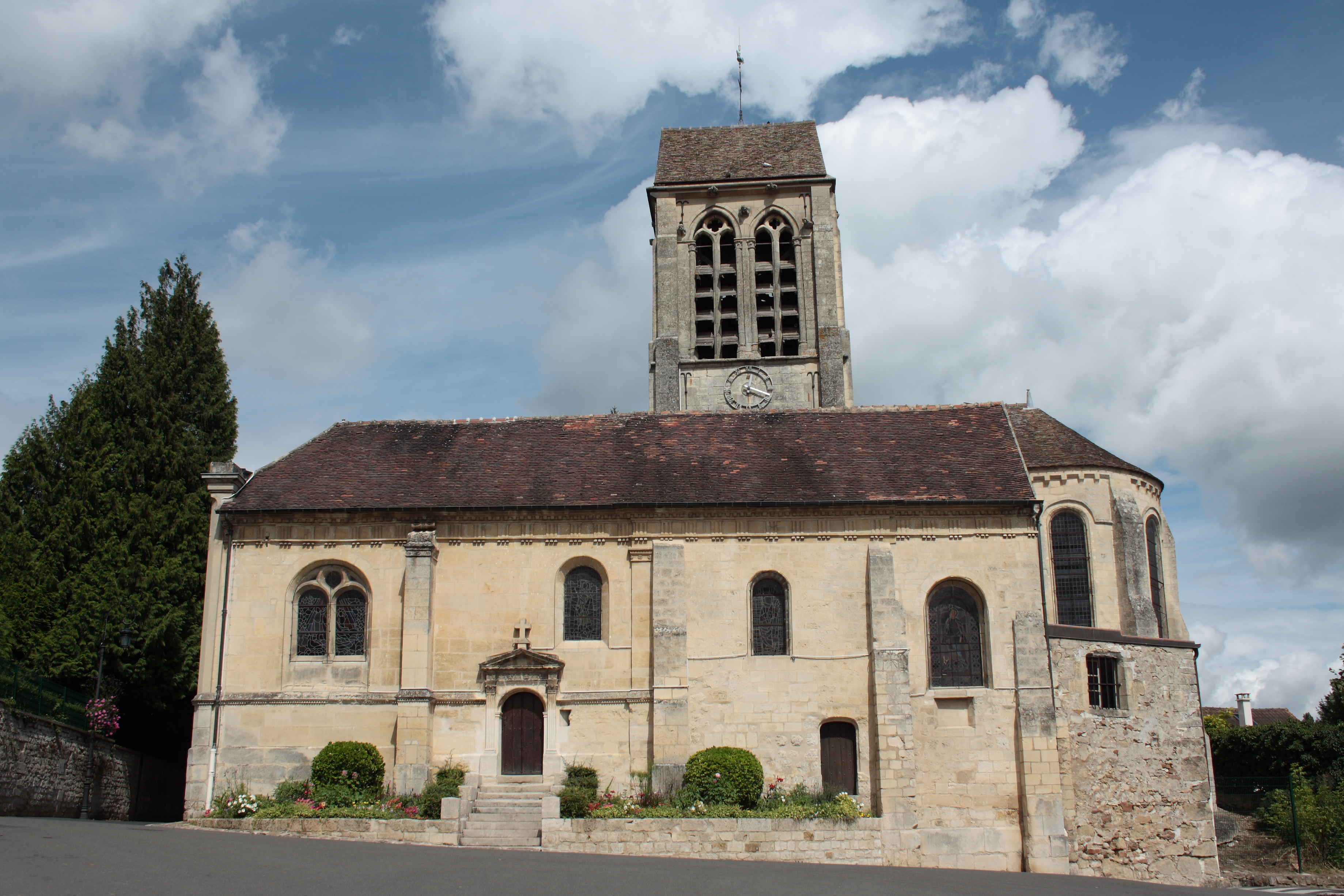 Katholische Kirche Saint-Denis in Jouy-le-Comte, einem Ortsteil von Parmain (Département Val-d’Oise) in der Region Île-de-France (Frankreich)